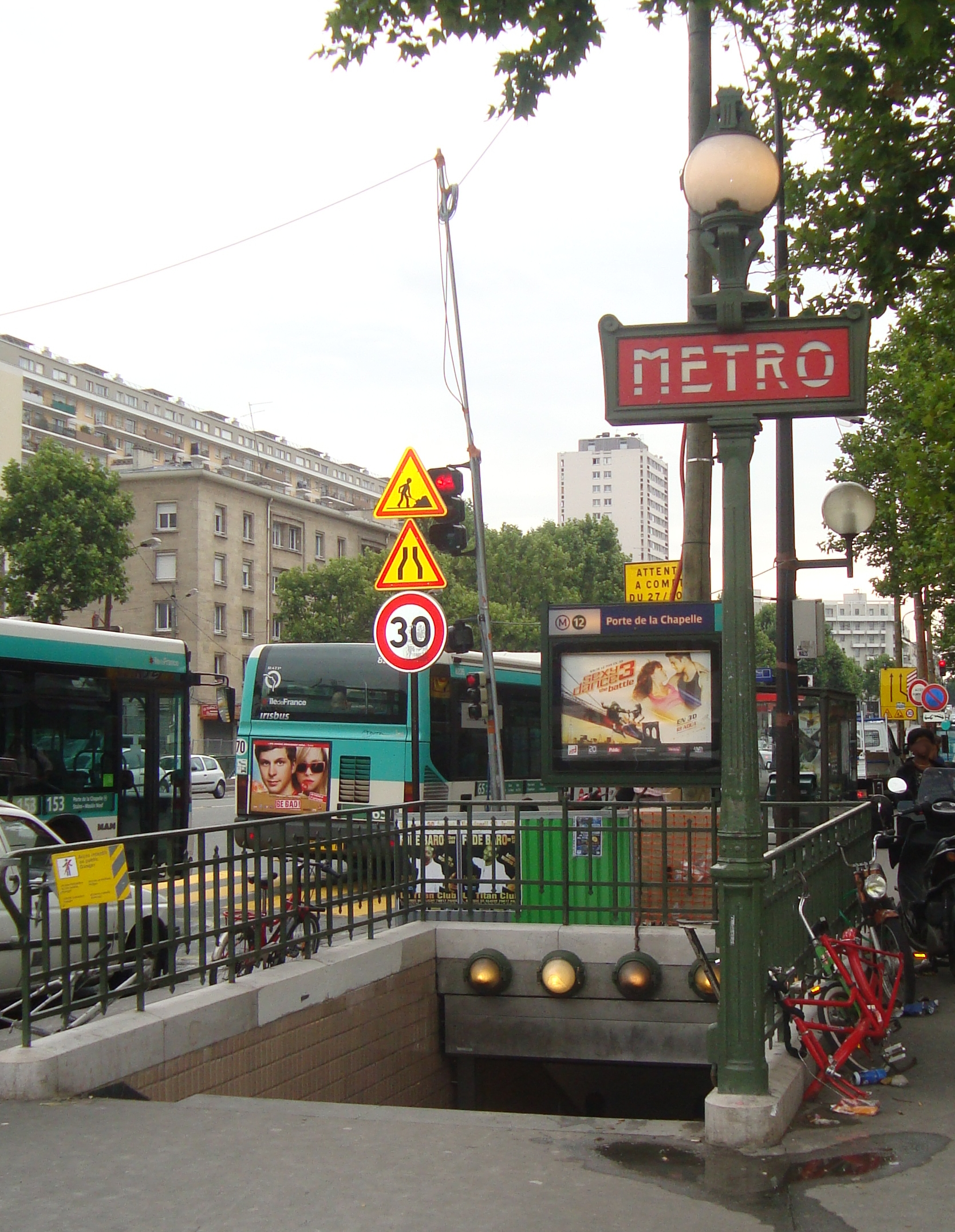 Accès de la station Porte de La Chapelle sur la ligne 12 du métro